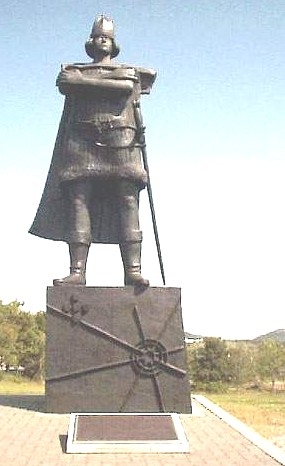 Descrição: Estátua do navegador Português Gaspar Corte-Real na Terra Nova ( St. John's – Newfoundland ) oferta do Estado Português. " Fonte/Créditos: Fotografias Imagens ilustrações do usuário registrado. (Não protegidos por copyright). Igualmente provenientes da minha Webpage " Les Photos du Grand-Lancy " " À la Découverte du Monde..." (Não protegidos por copyright). Licença: (Não protegidos por copyright). José Manuel CH--GE 16:56, 29 Outubro 2005 (UTC)